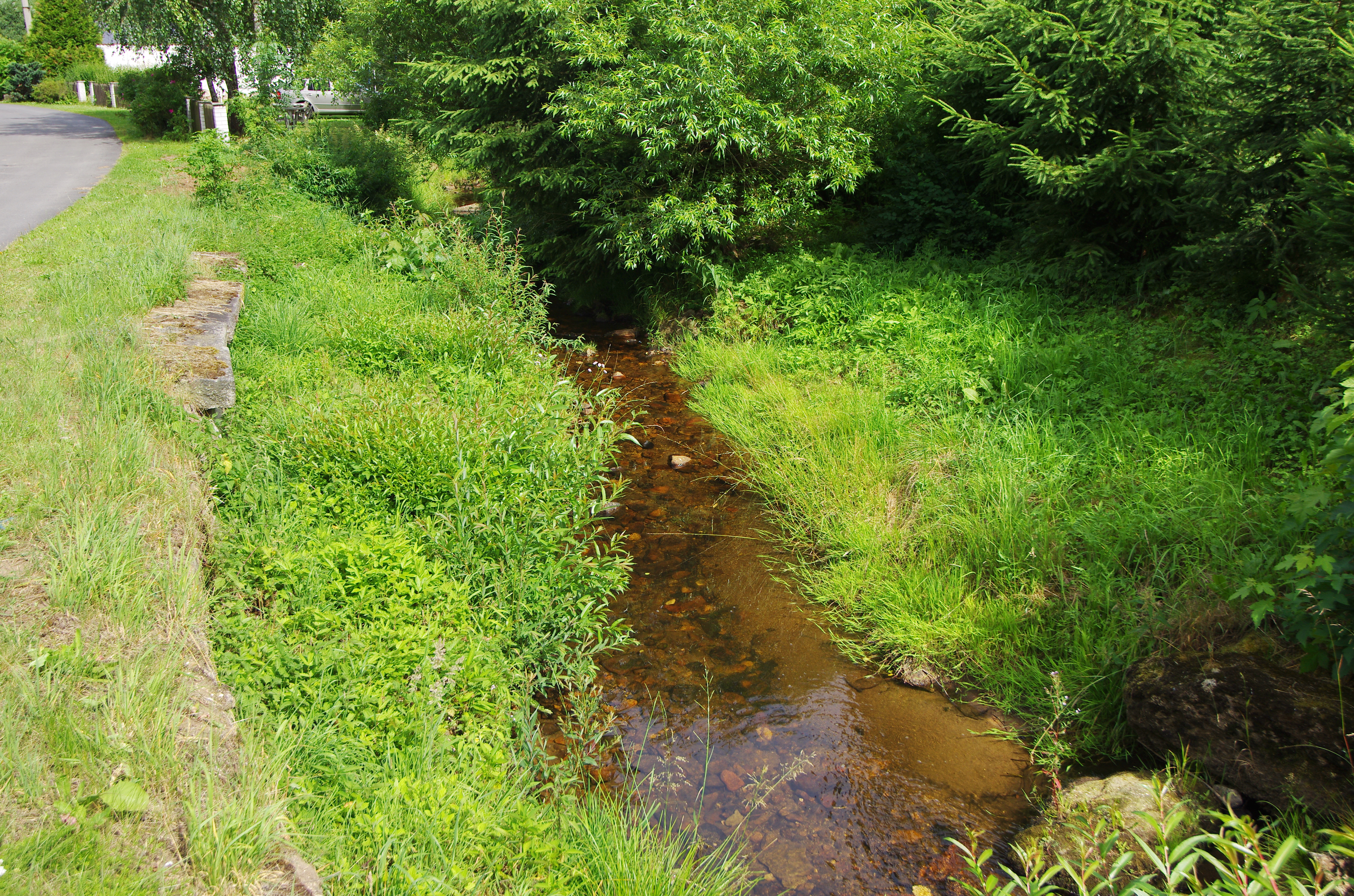 Dolní Hluboká, čast obce Krásno, Dolský potok v osadě, okres Sokolov